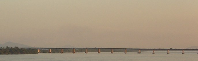 Ponte sobre o Rio Branco